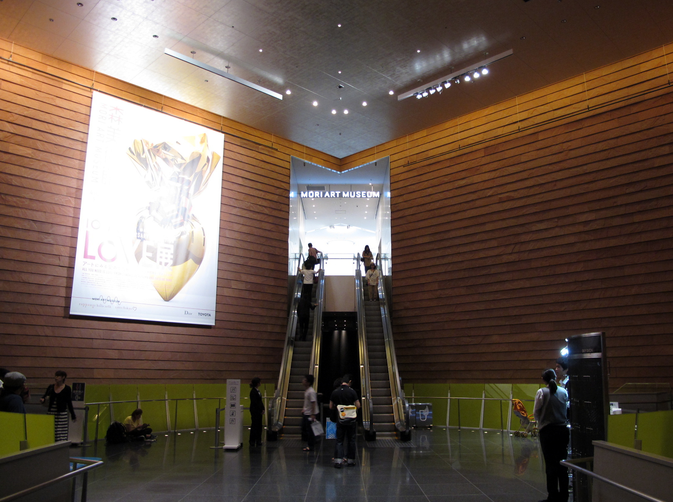 Mori Art Museum Entrance